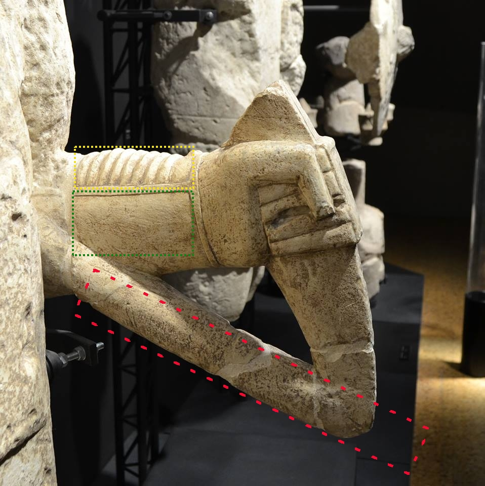 particolare braccio arciere monte prama